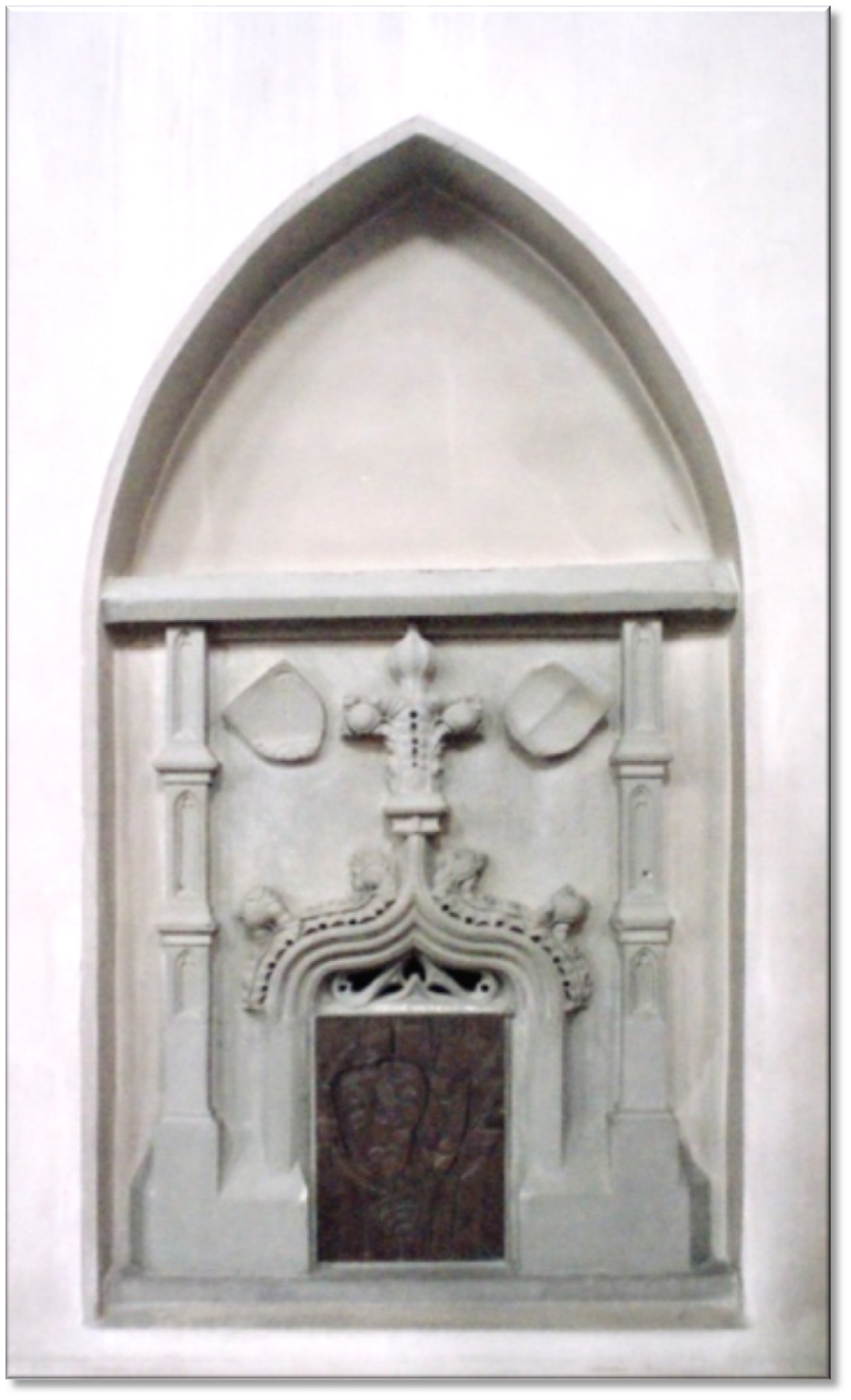 1,21 m hoch, 1,05 m breit, Sandstein. Vermutlich 1471 bei der Erweiterung der Kirche entstanden. Sie wurde 1882 von der alten Kirche übernommen. Die Öffnung ist portalähnlich von einem Kielbogen mit Krabben und Kreuzblume eingefasst, die von zwei schräg gestellten Wappenschildern flankiert ist.